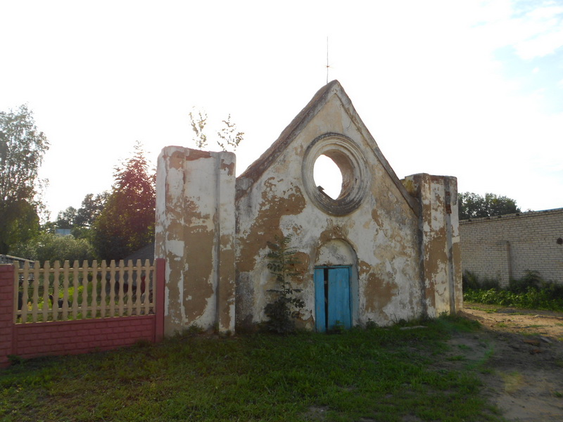 Тарнова. Сядзіба Грабоўскіх. Лядоўня